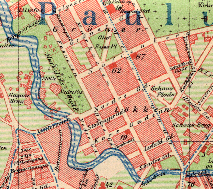 Grünerløkka, Oslo.